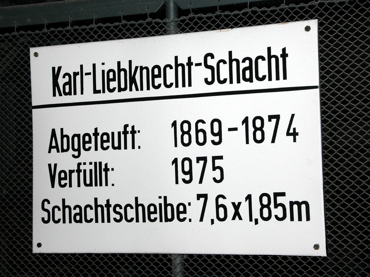 Schild am Kaiserin-Augusta-Schacht / später Karl-Liebknecht-Schacht im heutigen Bergbaumuseum Oelsnitz/Erzgebirge. Abgeteuft wurde von 1869-1874. Die Schachtscheibe hat hier die Form eines langgezogenen Rechtecks.